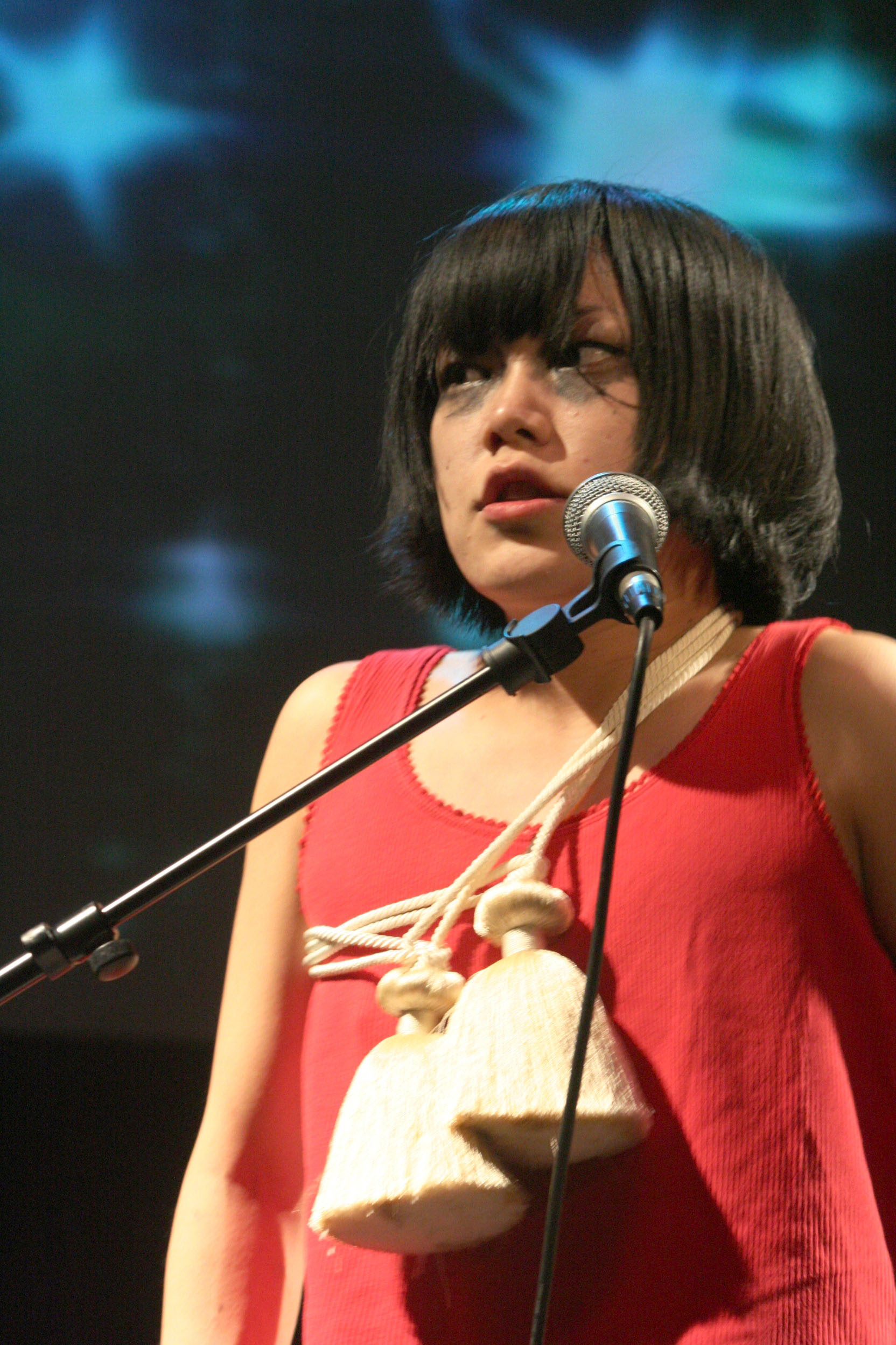 DODDODO